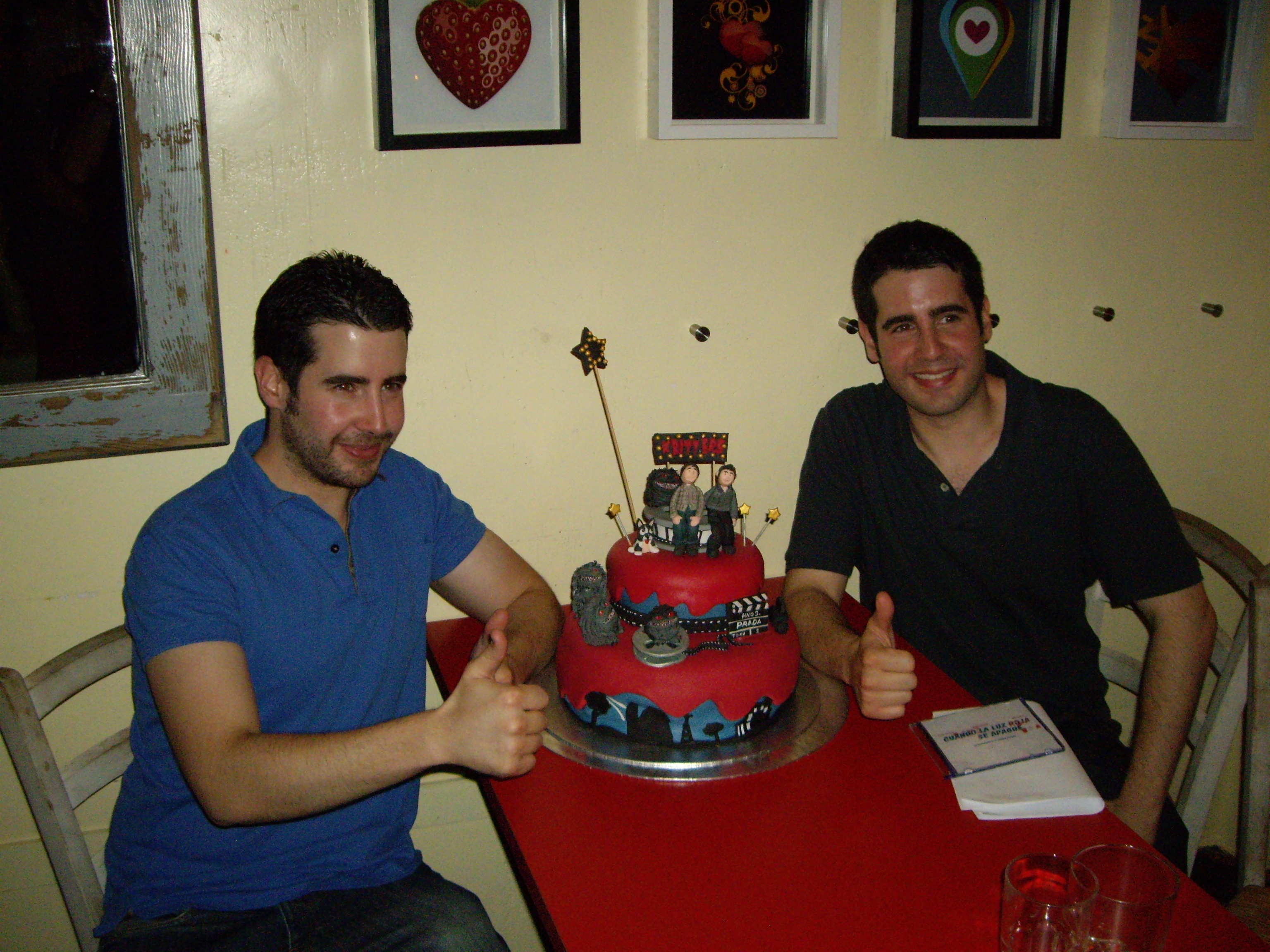 Los Hermanos Prada, Kiko y Javi. Julio 2012.